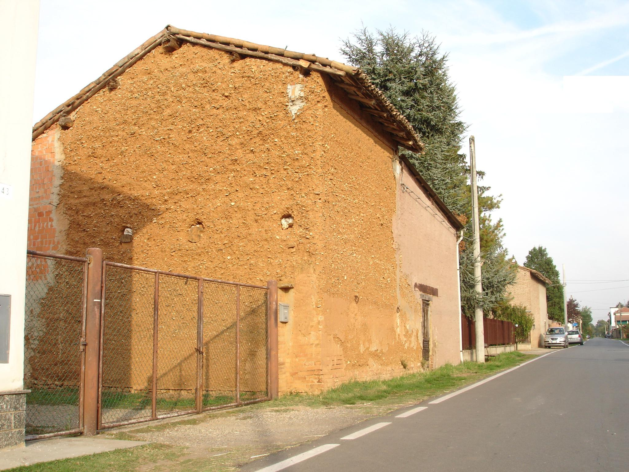 Una "trunera" a San Giuliano Nuovo